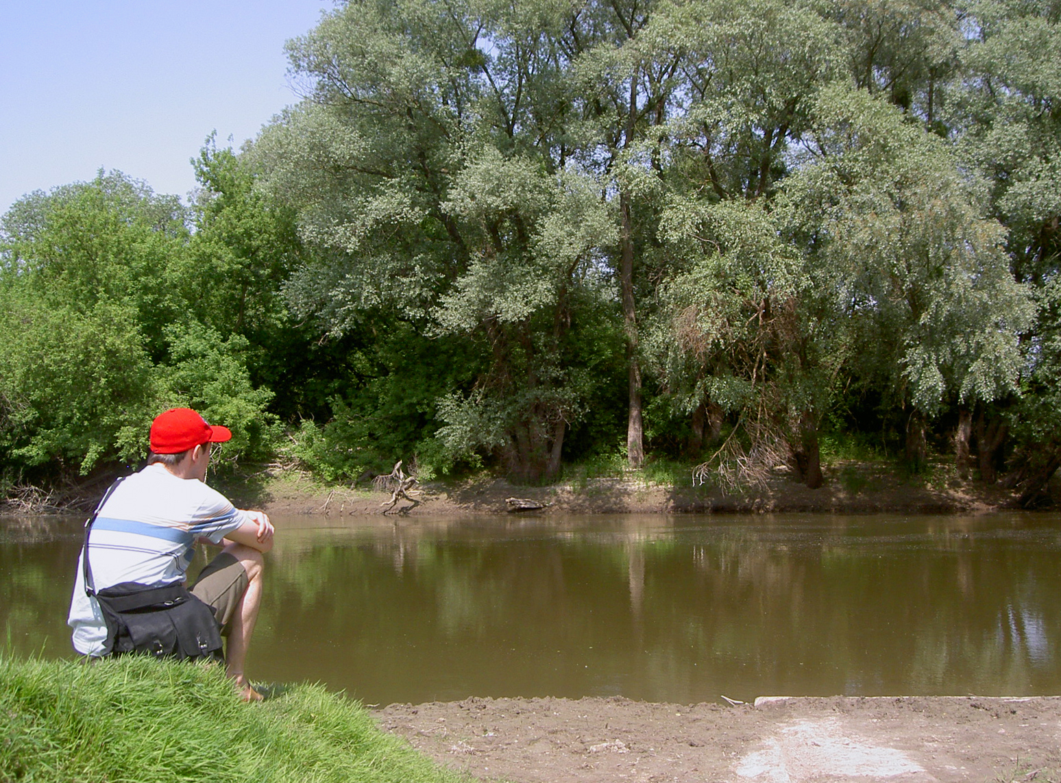 Horodło, Poland • rzeka Bug / Western Bug river